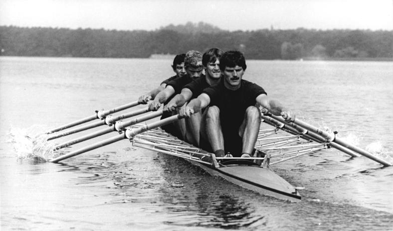 Nationalmannschaft, DDR, Doppelvierer ADN-ZB Mittelstädt 19.8.82 Berlin: DDR-Doppelvierer im Training für die Weltmeisterschaft im Rudern- Als Titelverteidiger sitzen erneut im Boot Schlagmann Martin Winter (vorn), Uwe Heppner (dahinter) und Karl-Heinz Buss:Ert (hinten). Neu hinzugekommen ist Uwe Mund (3. v. vorn). Achtung! Bitte offizielle Nominierung am 20.8.82 beachten!